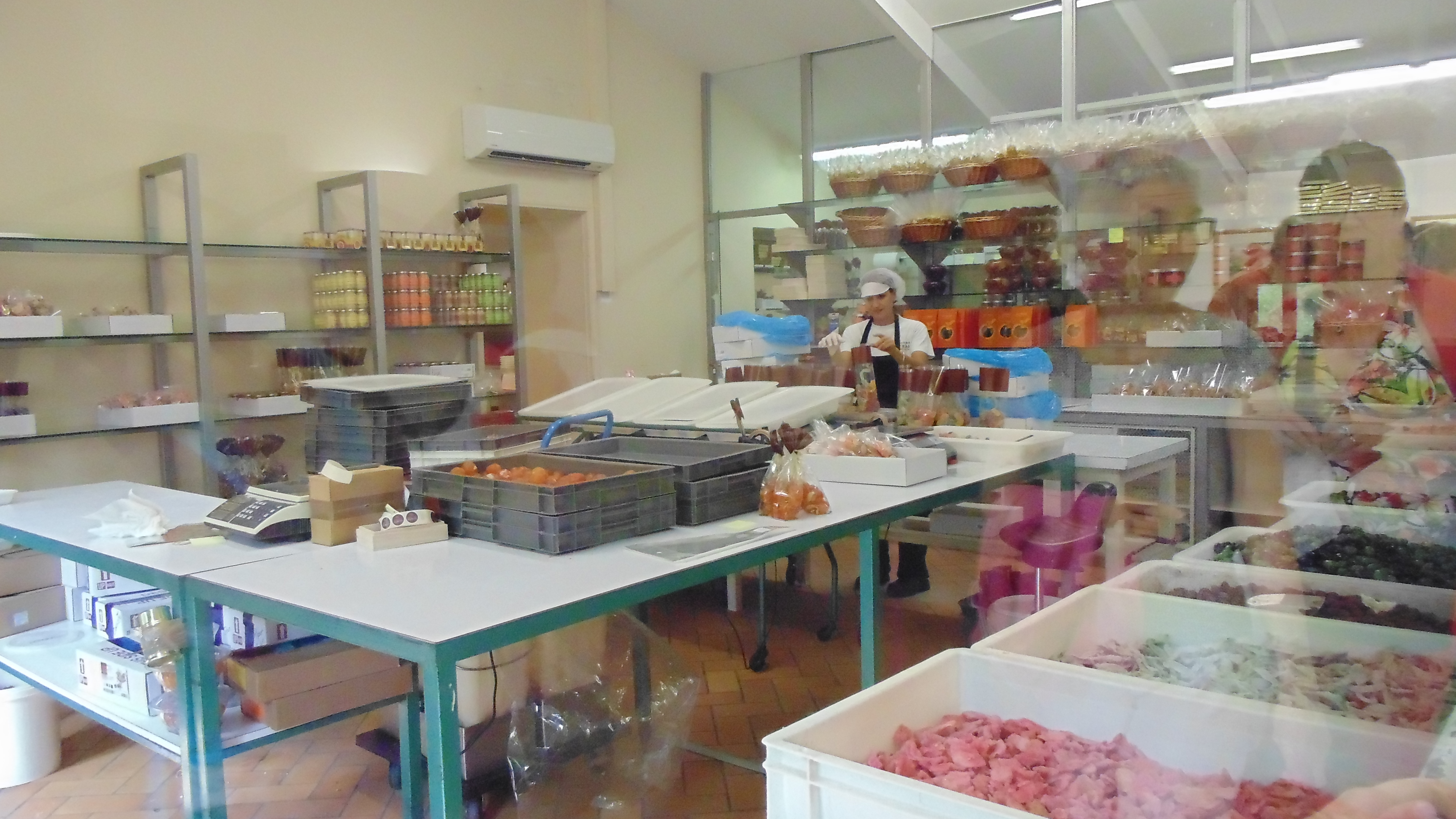 Confiserie Florian des Gorges du Loup situé au Pont du Loup de Tourrettes-sur-Loup